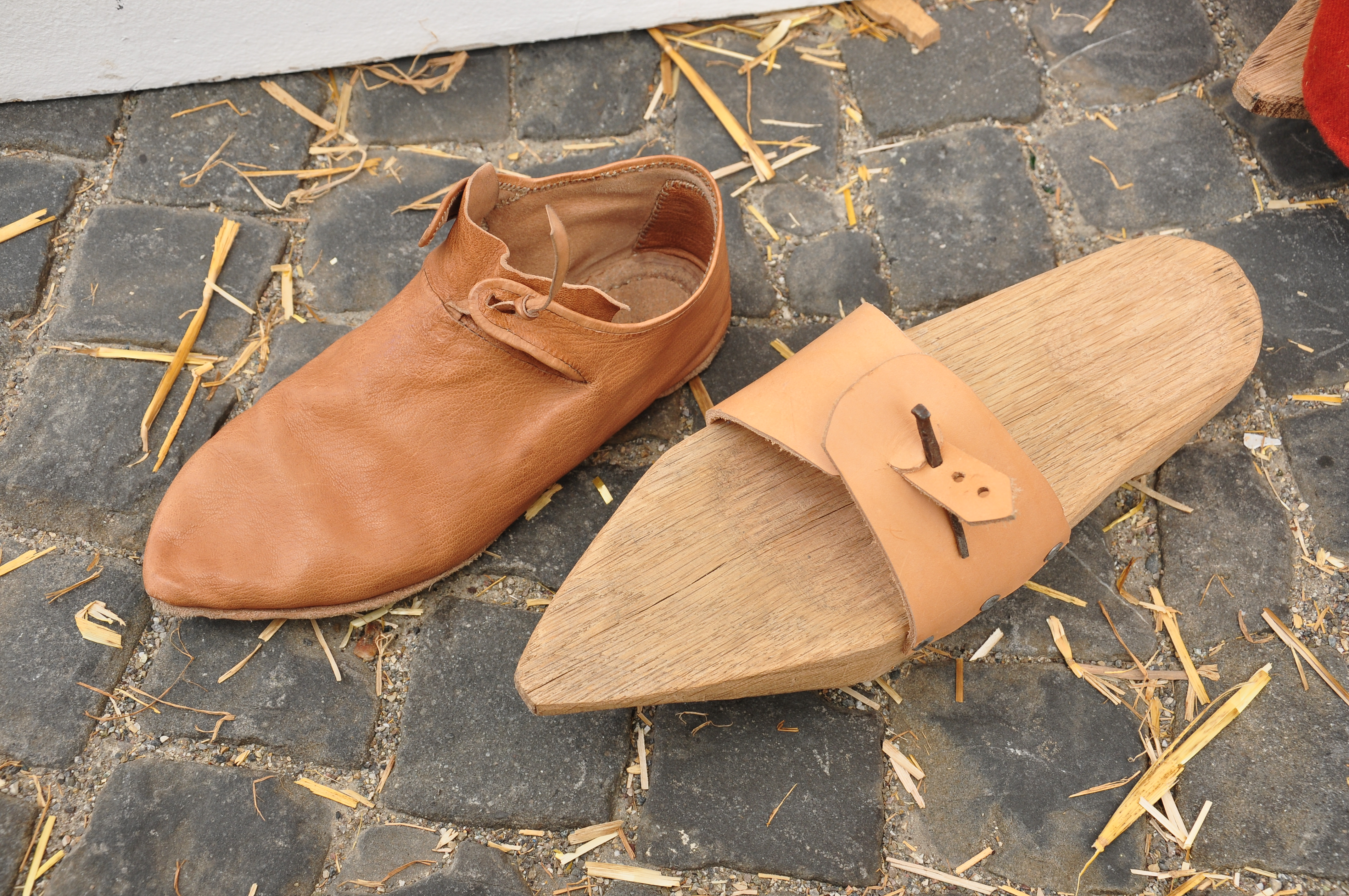 Rekonstruktionen eines mittelalterlichen Halbschuhs (links) und einer Trippe (rechts). Mittelalter Spectaculum (20. bis 22. Mai 2011) der Gesellschaft zu Fraumünster auf dem Münsterhof in Zürich (Switzerland)